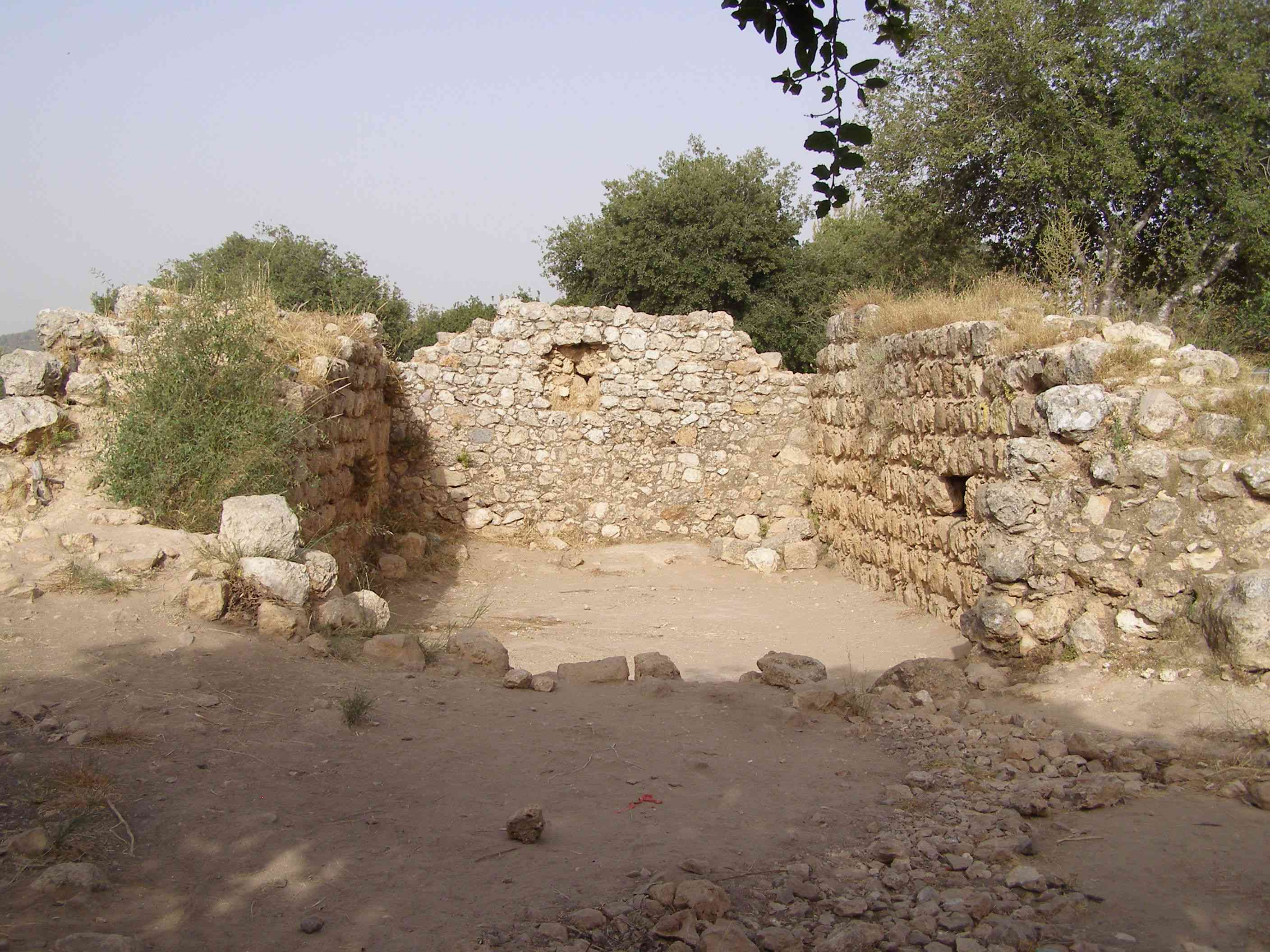 Hurva Hanot, Israel